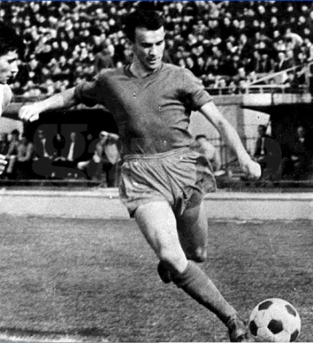 Carol Creiniceanu